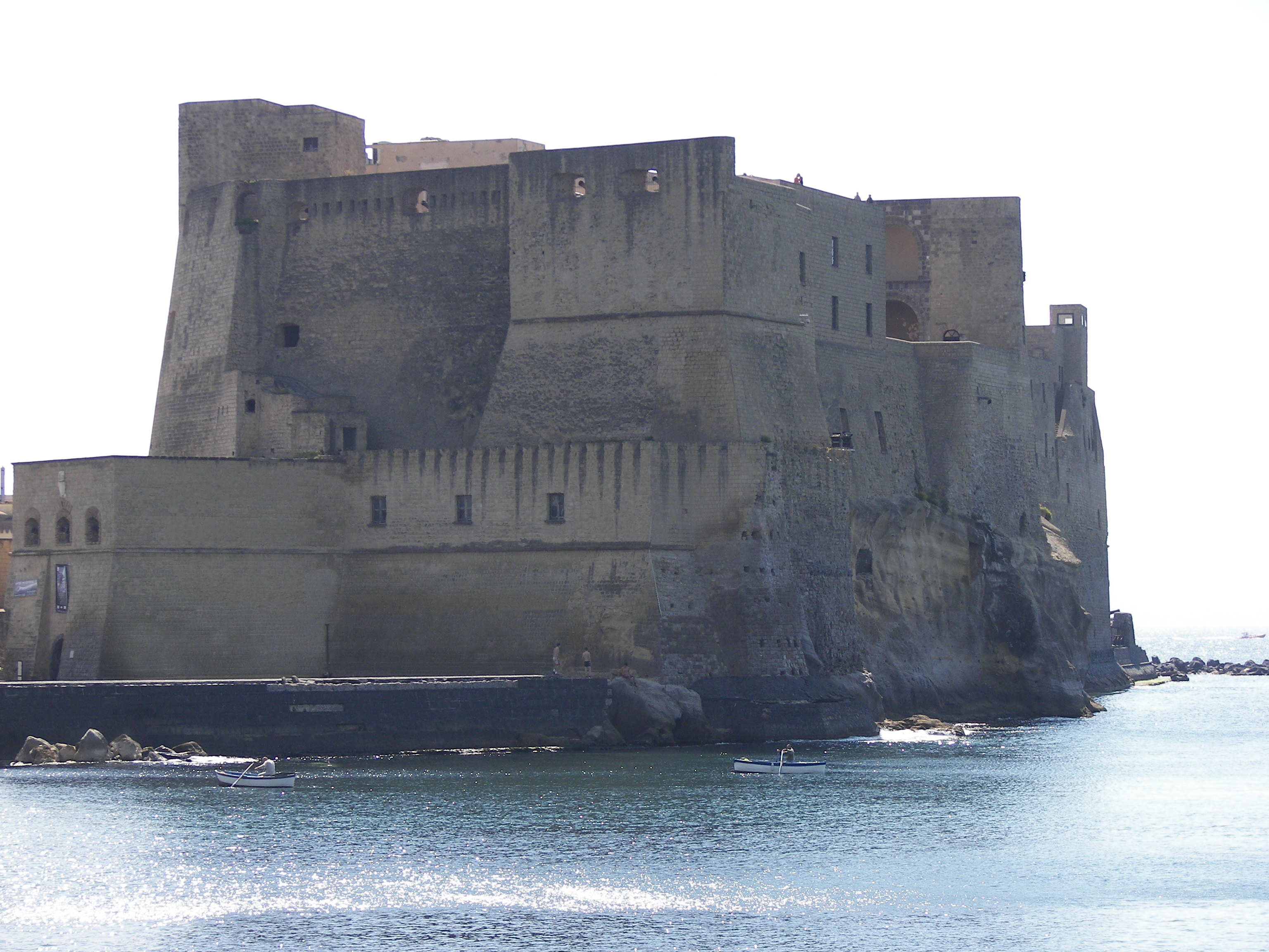 Castel dell'Ovo in Napoli.